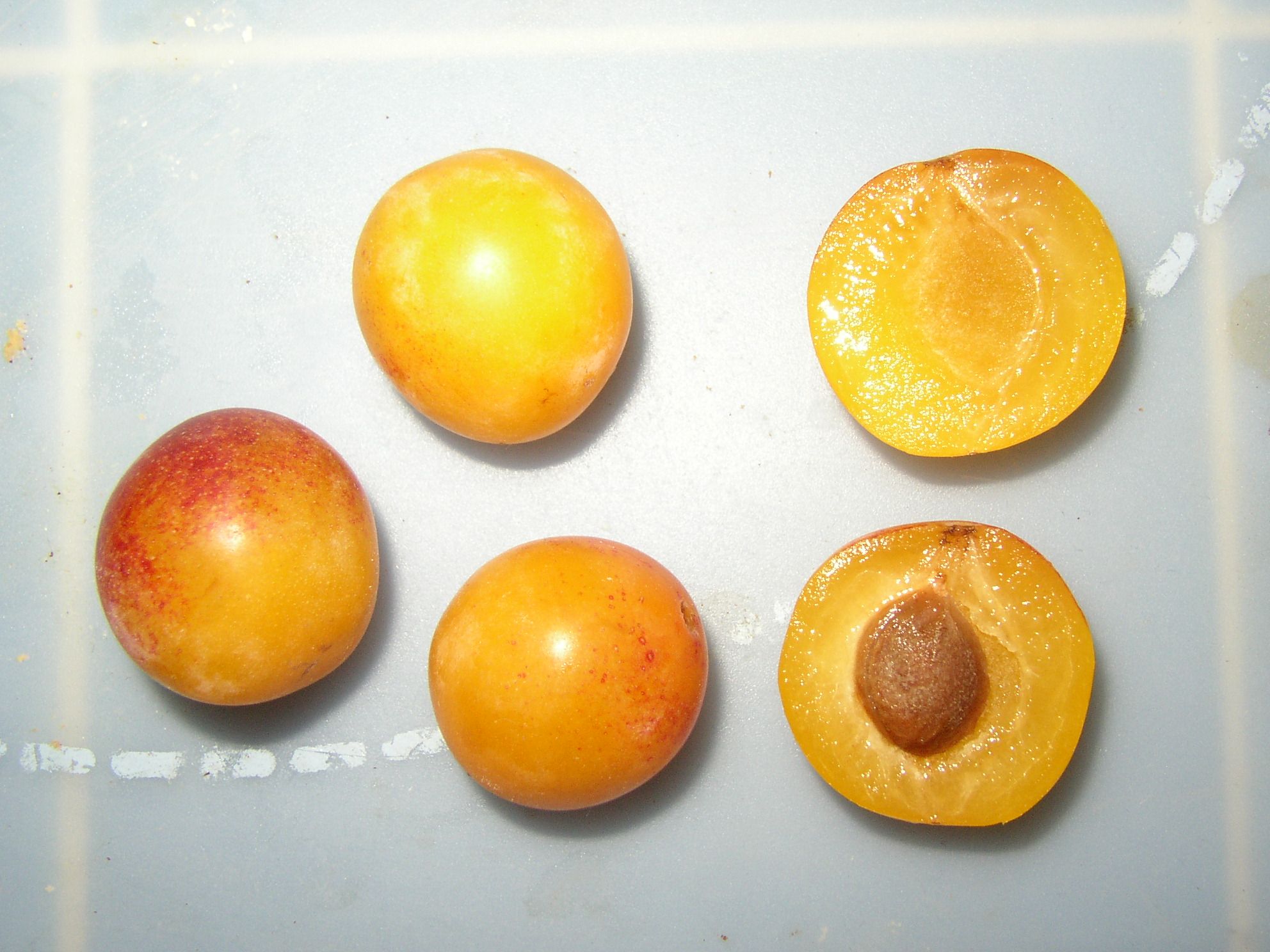 Quelques mirabelles. Photo prise par Sam Hocevar